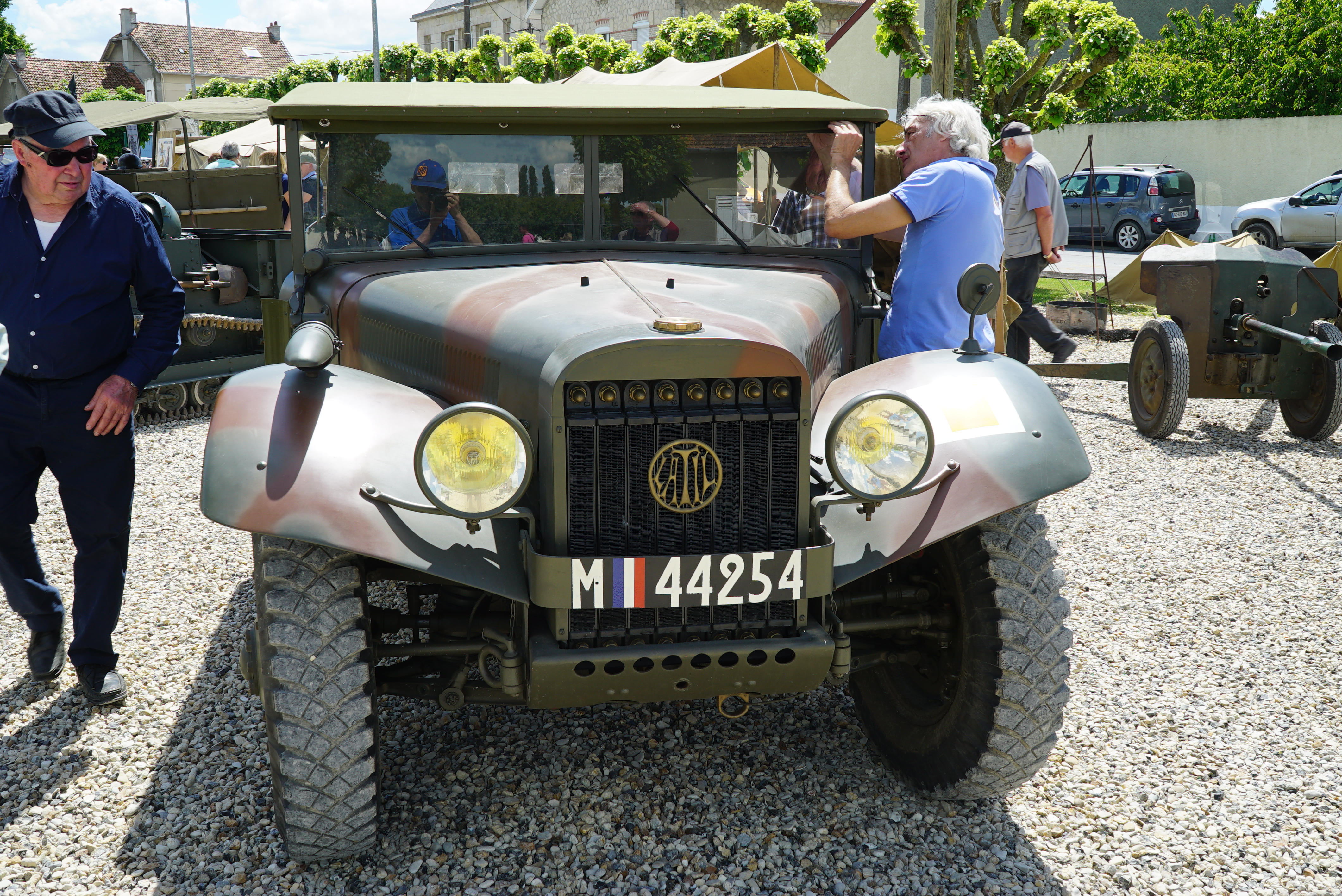 à Berry au Bac, evenement pour le centenaire de la bataille de chars de l'offensive Nivelle.